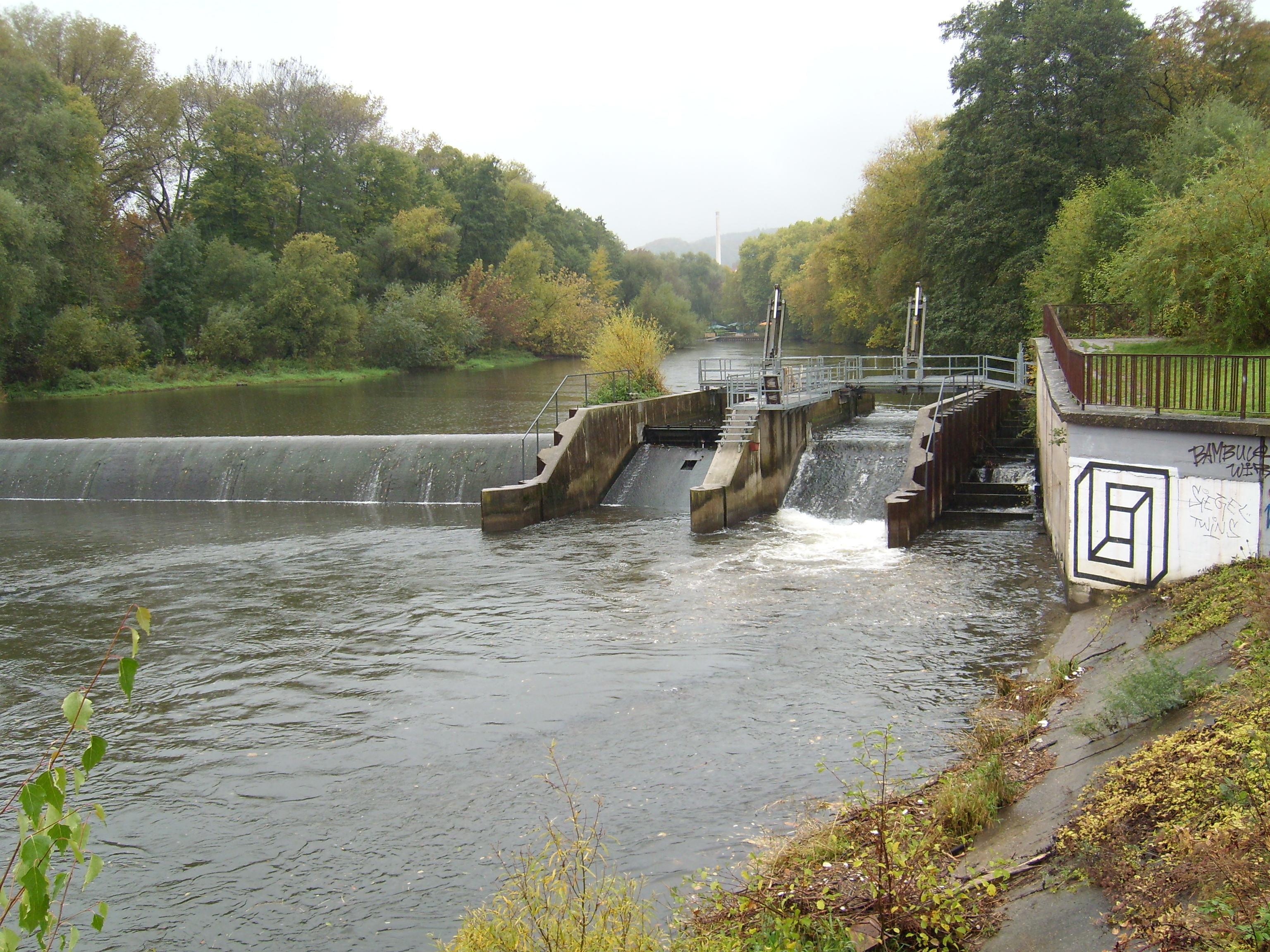 Reinigung des Rechens an einem der beiden Einläufe des Wasserkraftwerks am Paradieswehr in der Saale in Jena